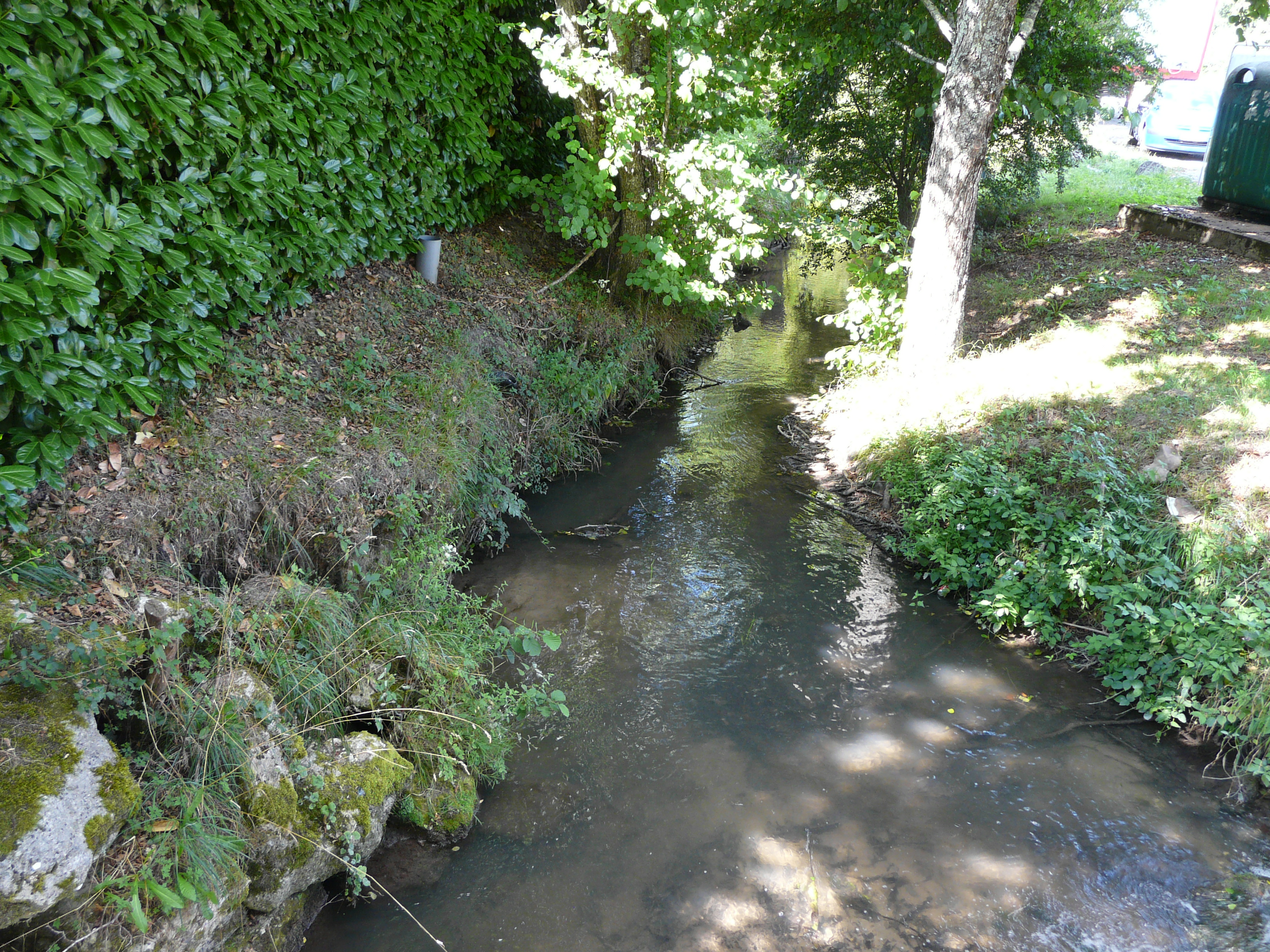 L'Eyraud en aval du pont de la route départementale 15, Lunas, Dordogne, France.